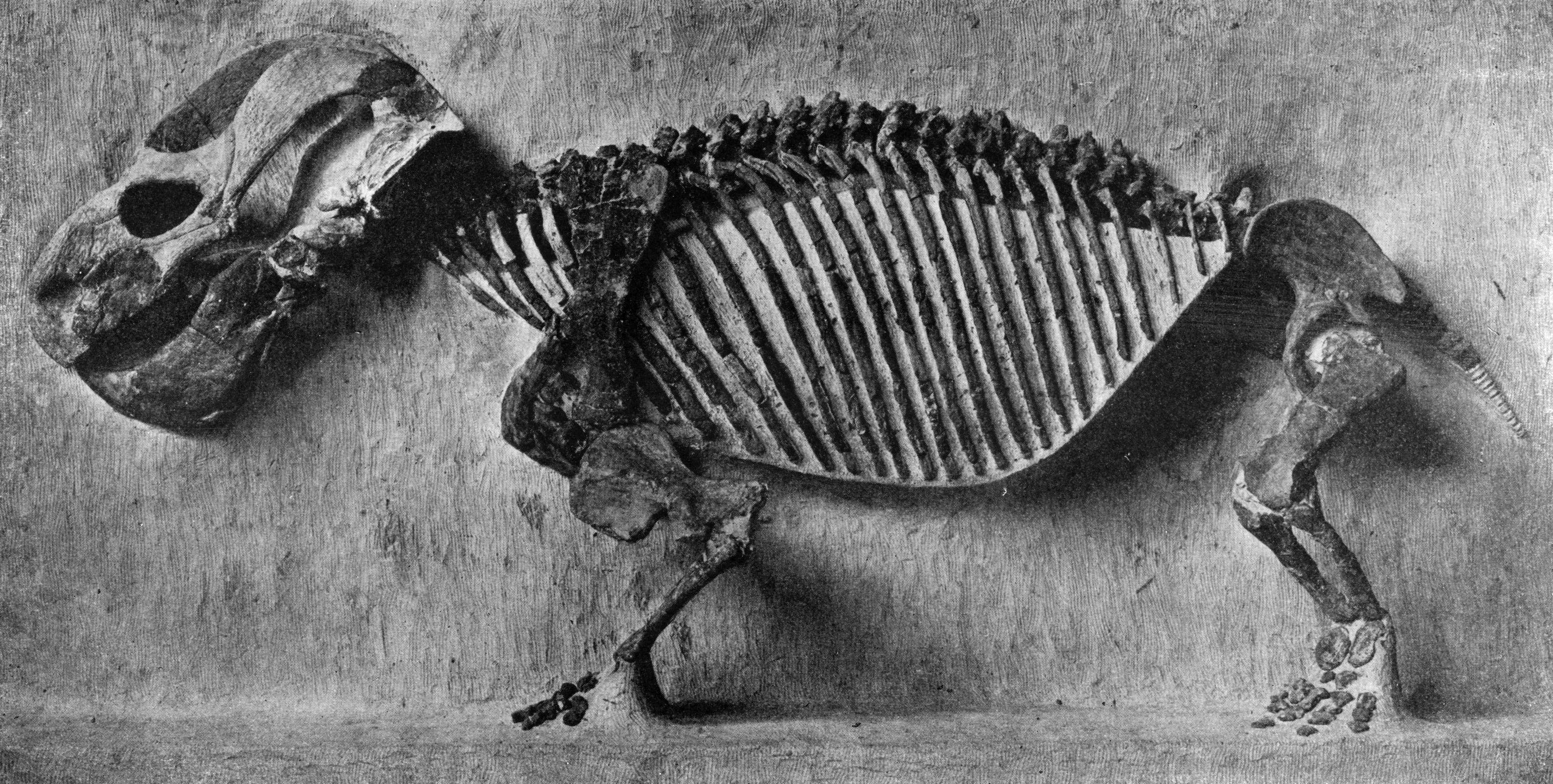 Endothiodon uniseries skeleton, specimen 5618